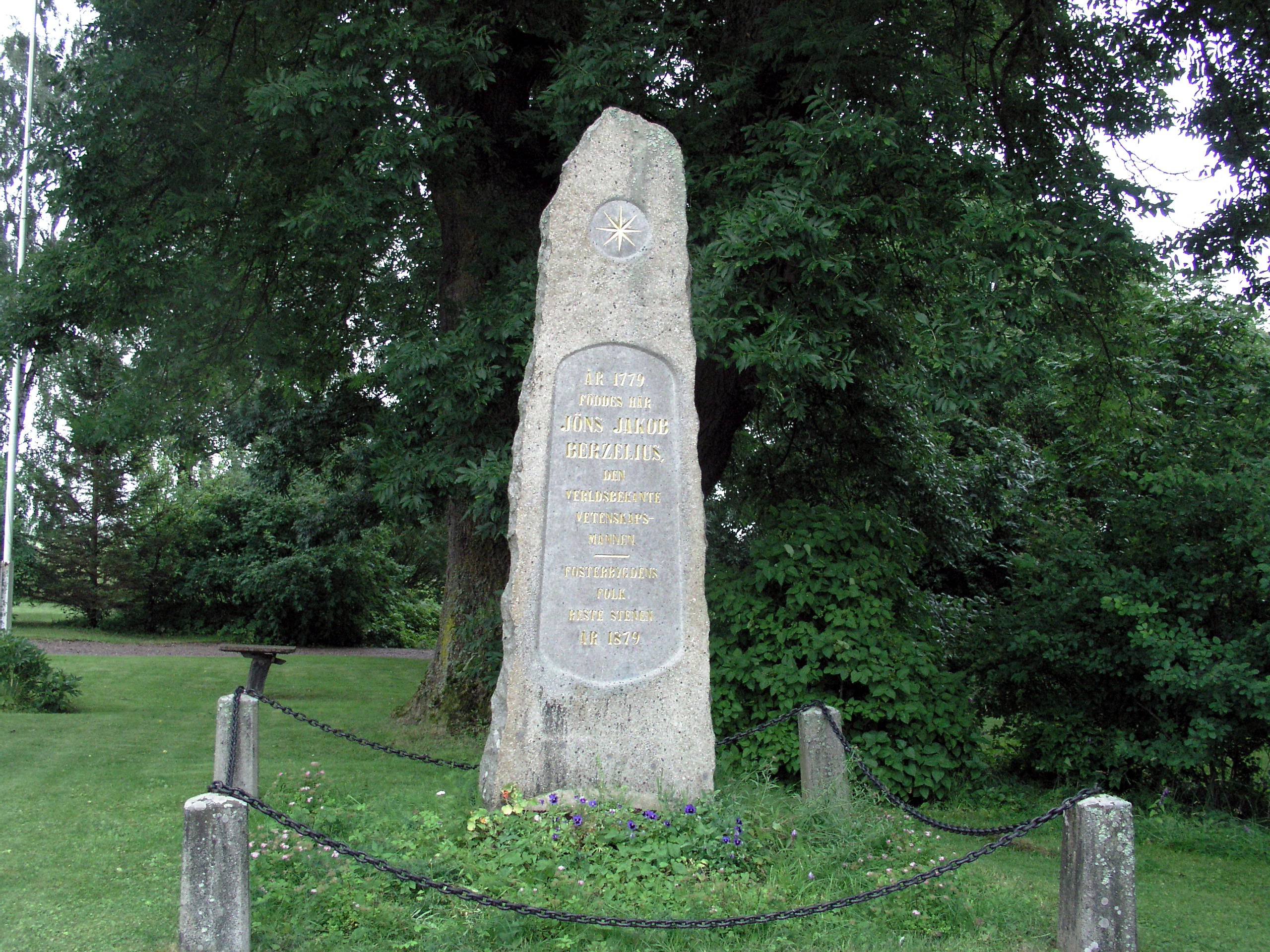 Väversunda kyrka / Väversunda church. The picture was taken by Håkan Svensson (Xauxa) the 30th of July 2005.